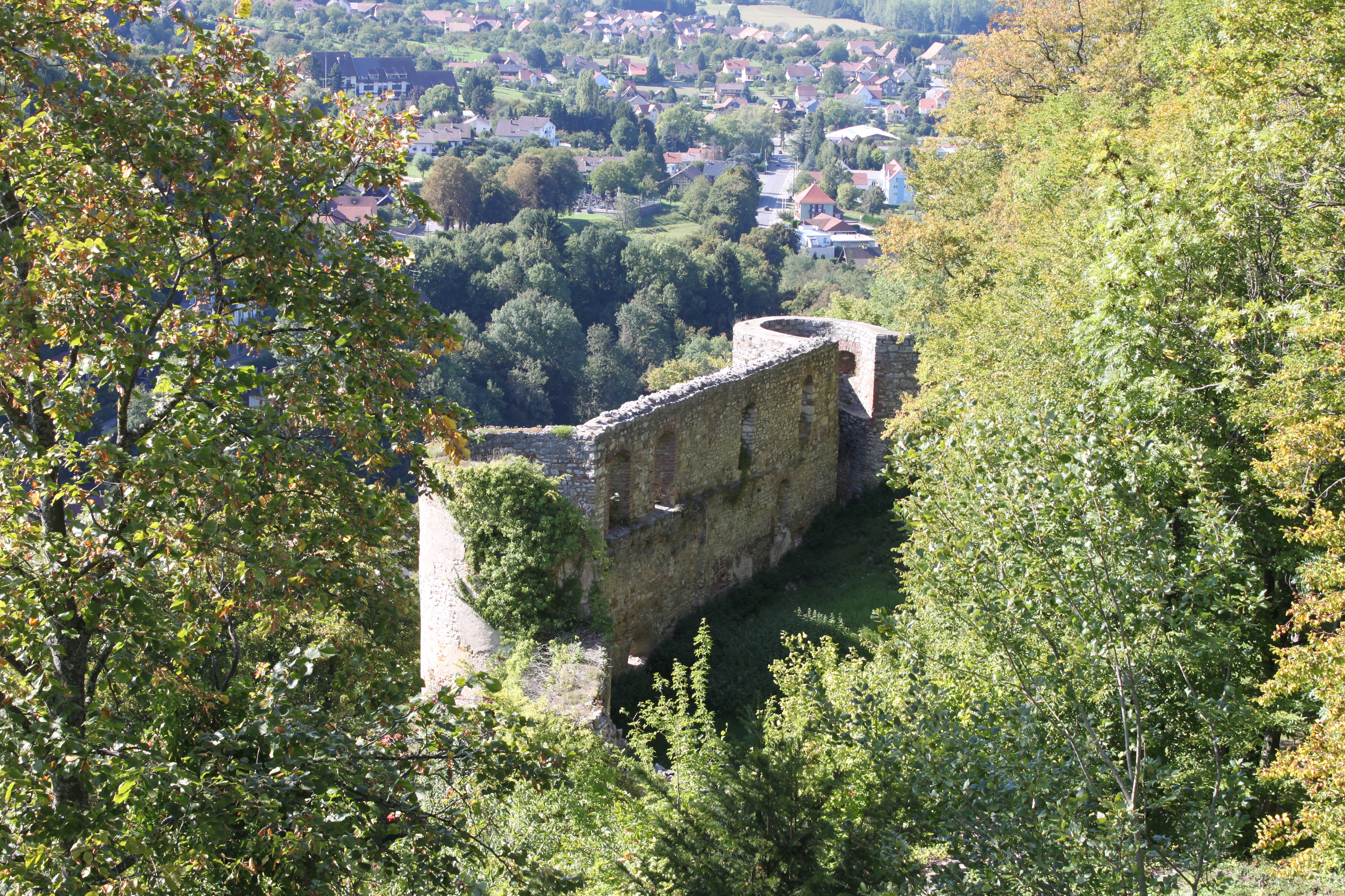 Ruines du château de Ferrette (14)